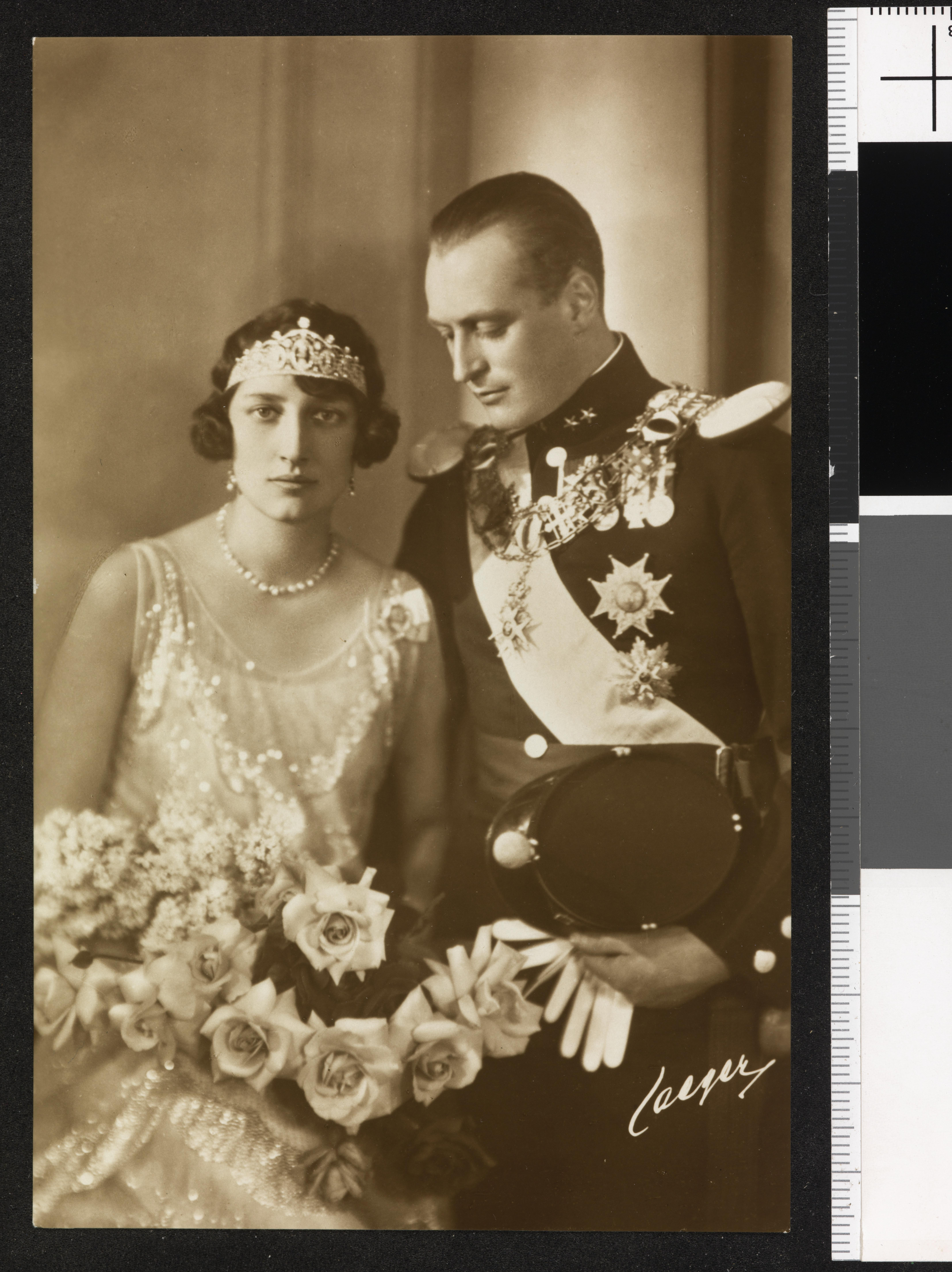 Bildet er hentet fra Nasjonalbibliotekets bildesamling. Anmerkninger til bildet var: Kortet tilhører en svensk fotoserie. Depicted person: Olav V konge av Norge Depicted person: Märtha kronprinsesse av Norge